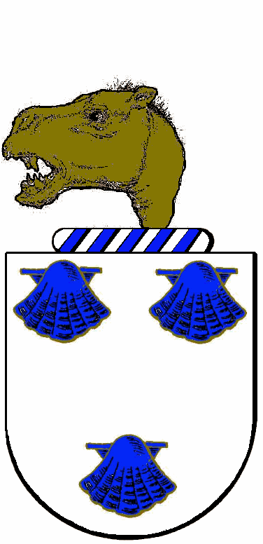 Brasão da Familia Camelo